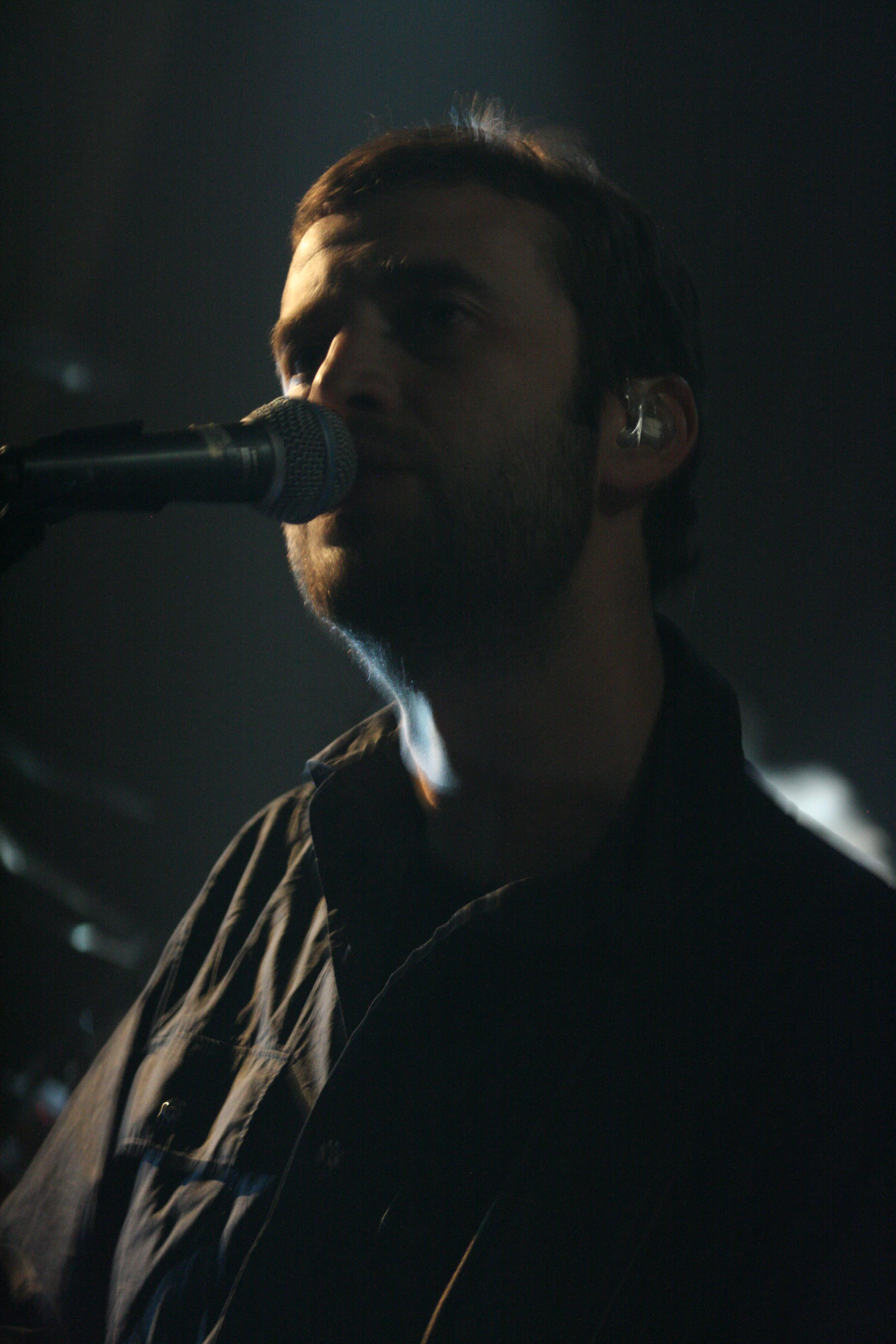 Zoé